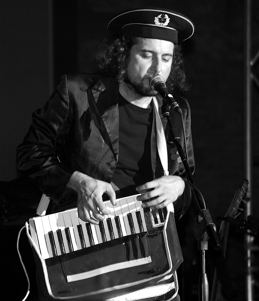 Vinicio Capossela in Concerta a Taormina, Italia, 9.2.2006Vinicio Capossella